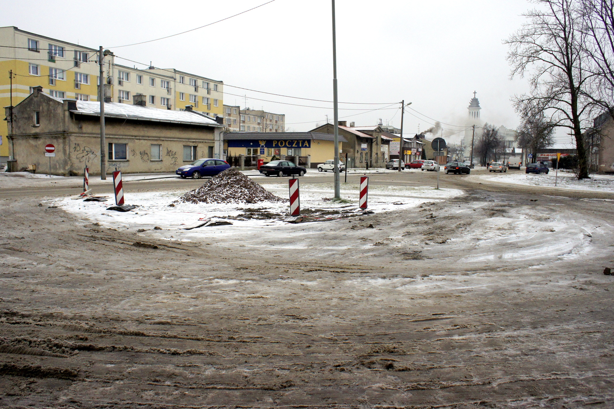 Dębiec, część Poznania. Domy bamberskie przy ul. 28 czerwca 1956 r. na tle zabudowy współczesnej